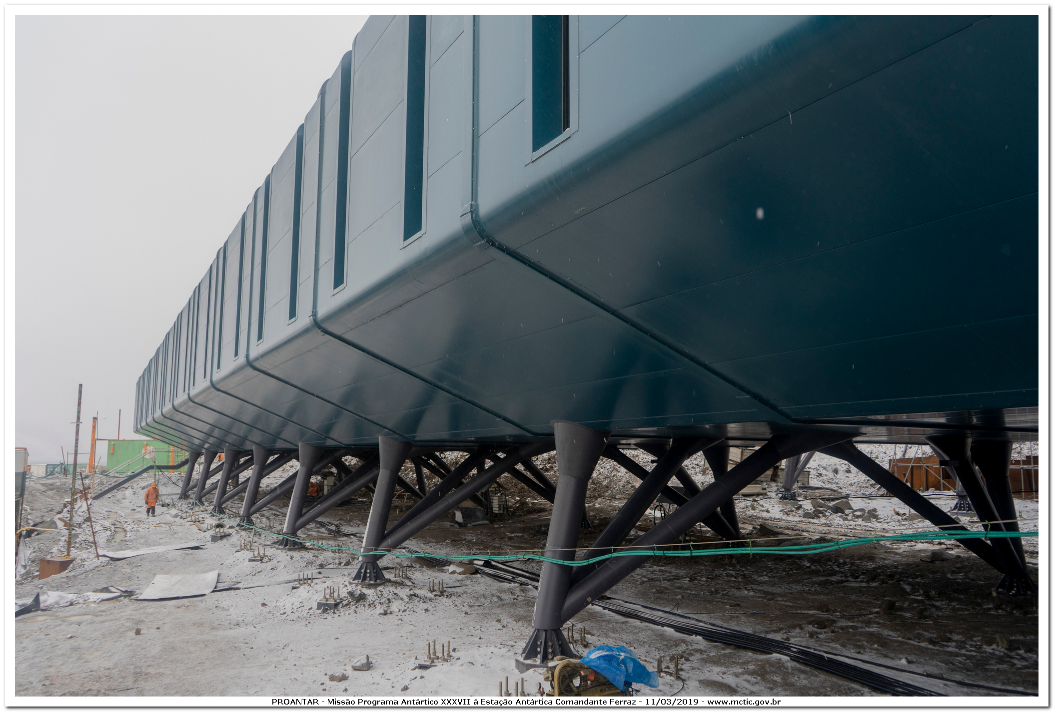 PROANTAR - Missão Programa Antártico XXXVII à estação Antartica Comandante Ferraz 11/03/2019 - Uma parceria entre Ministério da Ciência, Tecnologia, Inovações e Comunicações(MCTIC), Marinha do Brasil e Operadora Oi.